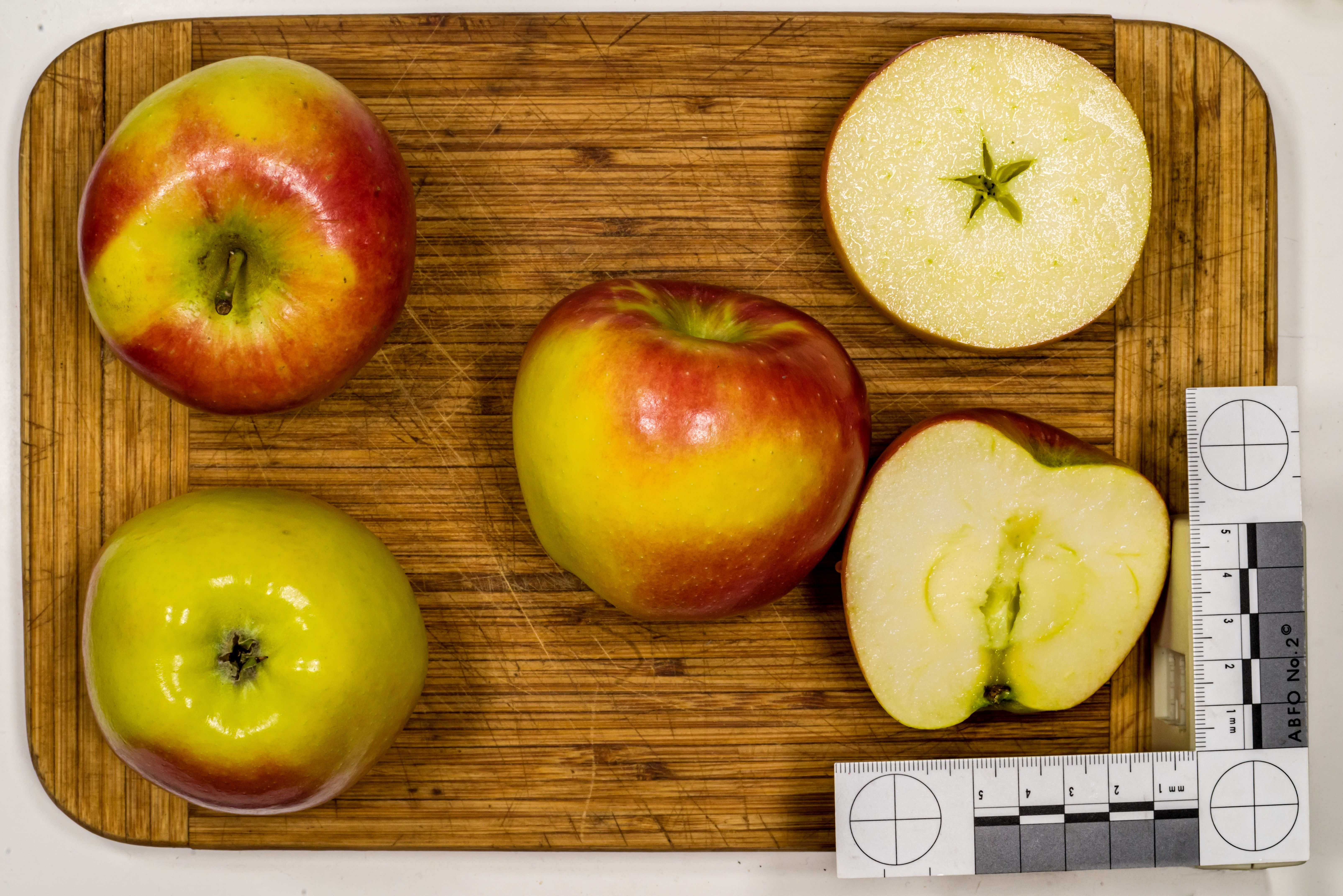 Apfelsorten Nicoter / Kanzi Apfel vom Bodensee